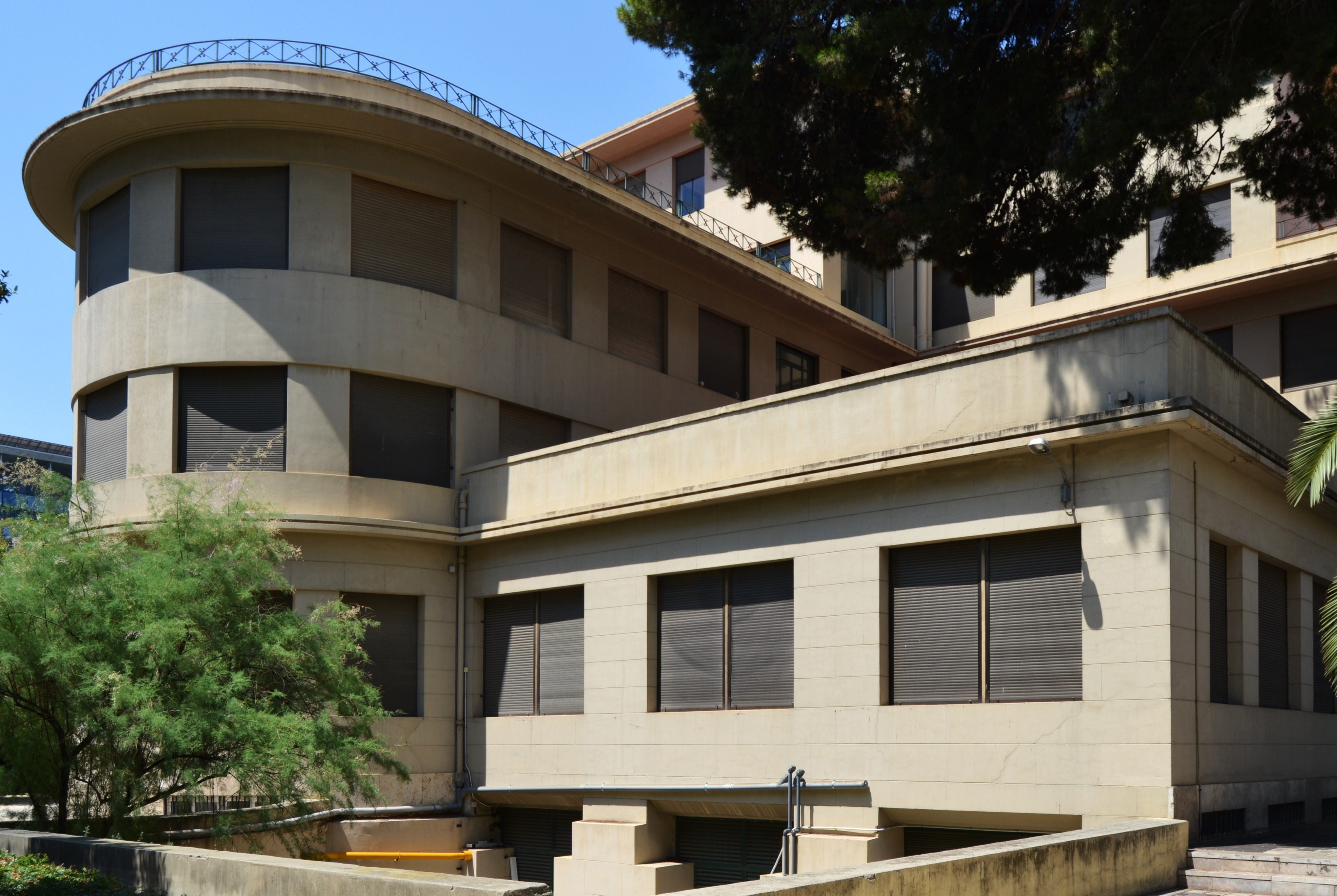 Col·legi Major Lluís Vives de València, lateral.